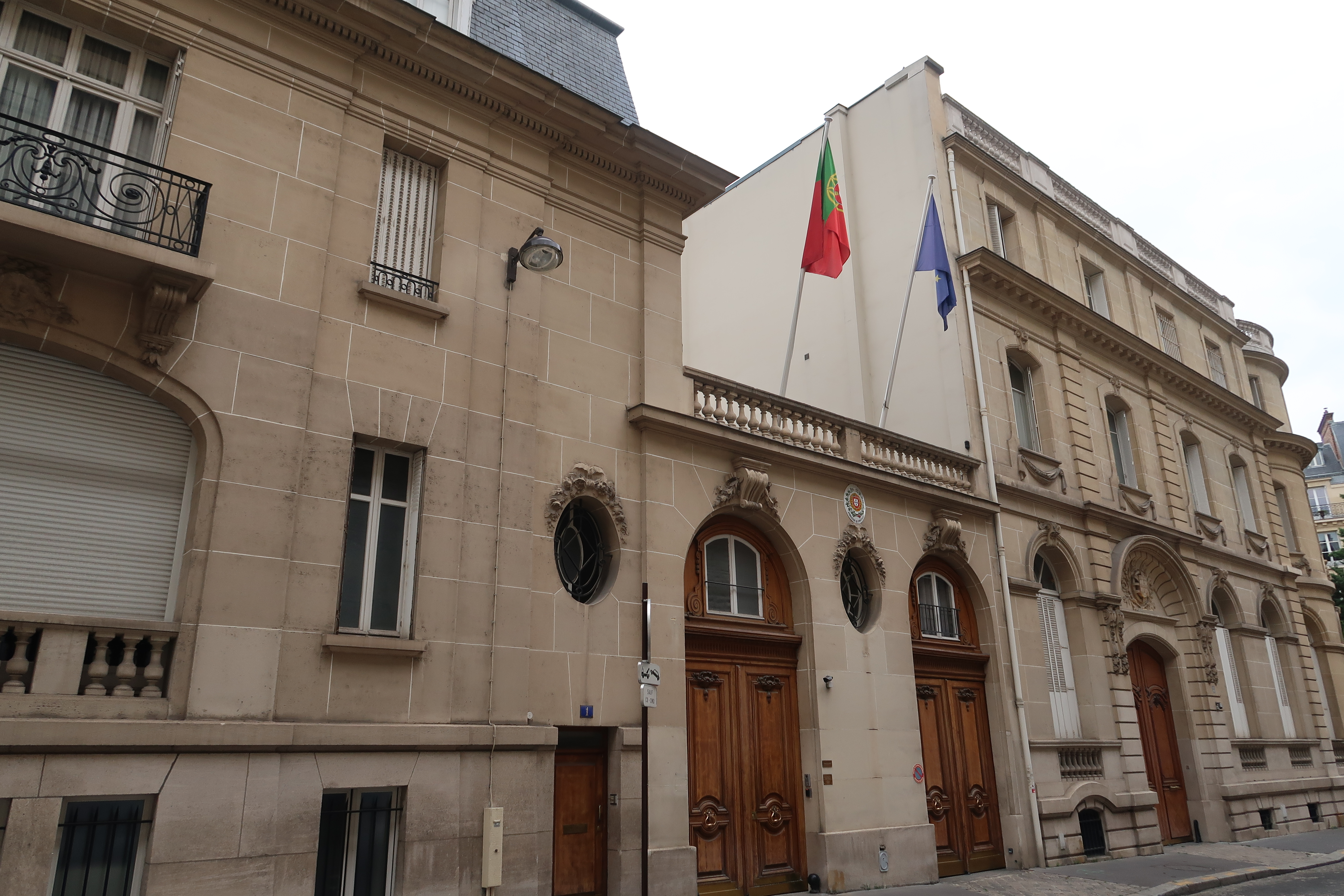 Ambassade du Portugal en France, 3 rue de Noisiel (Paris 16e).